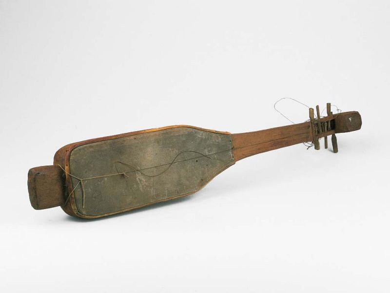 Tokkelinstrument. Tokkelluit met zes snaren Unknown language: Penting